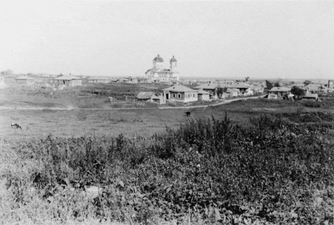 Село Большие Салы в период нацистской оккупации. В центре возвышается армянская церковь Сурб Аствацацин Пресвятой Богородицы